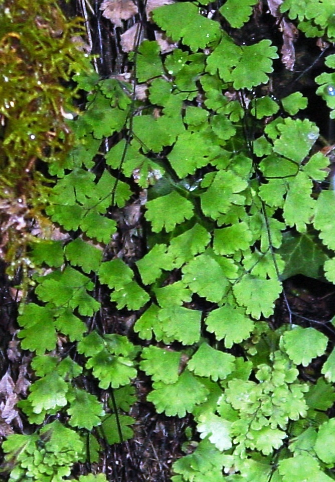 Parco dei Nebrodi, Sicily Adiantum capillus-veneris